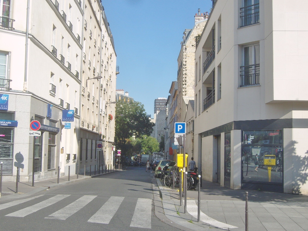 Paris 13e arrondissement - Rue de la Maison-Blanche - vue vers l'est à hauteur de l'avenue d'Italie